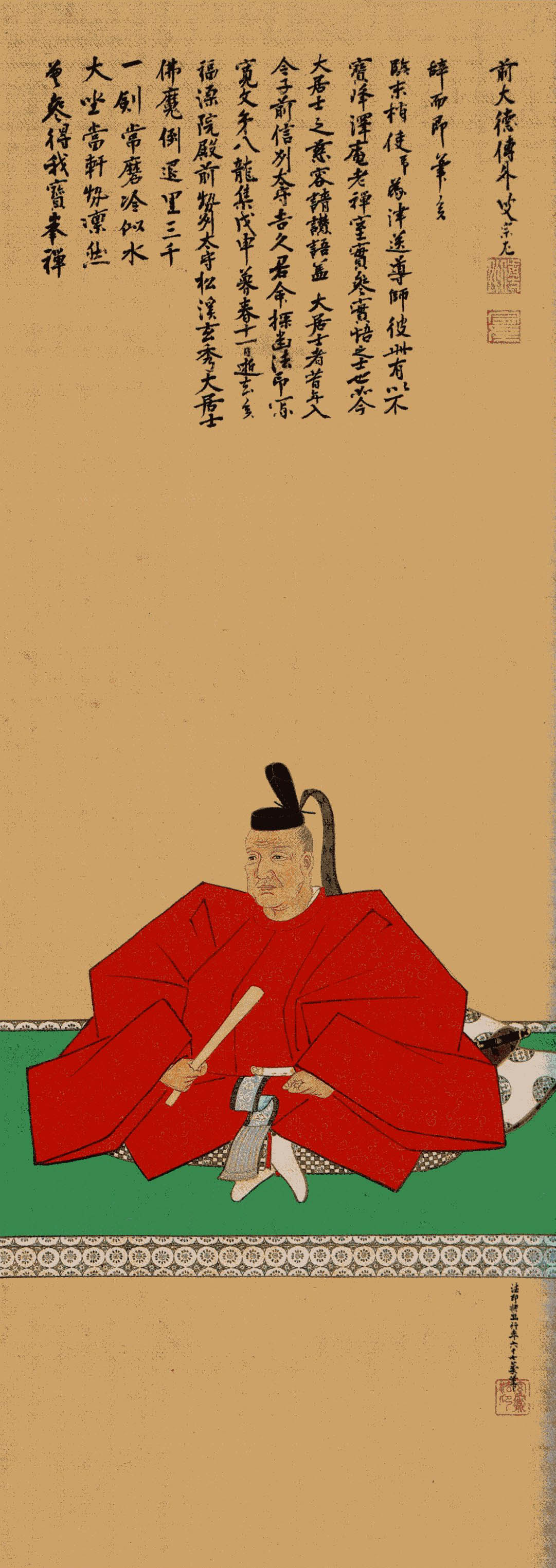 小出吉親像 園部藩初代藩主。 ［説明］ 狩野探幽筆 徳雲寺蔵 1軸